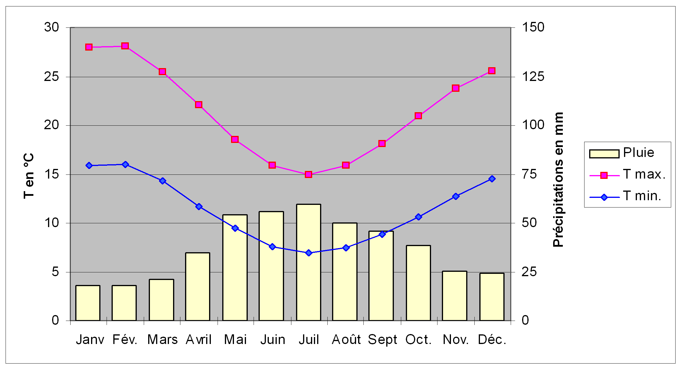 Diagramme climatique de la ville d'Adélaïde (Australie), comprenant deux courbes, représentant les températures maximales et minimales, et un histogramme, représentant la pluviométrie, pour les douze mois de l'année.